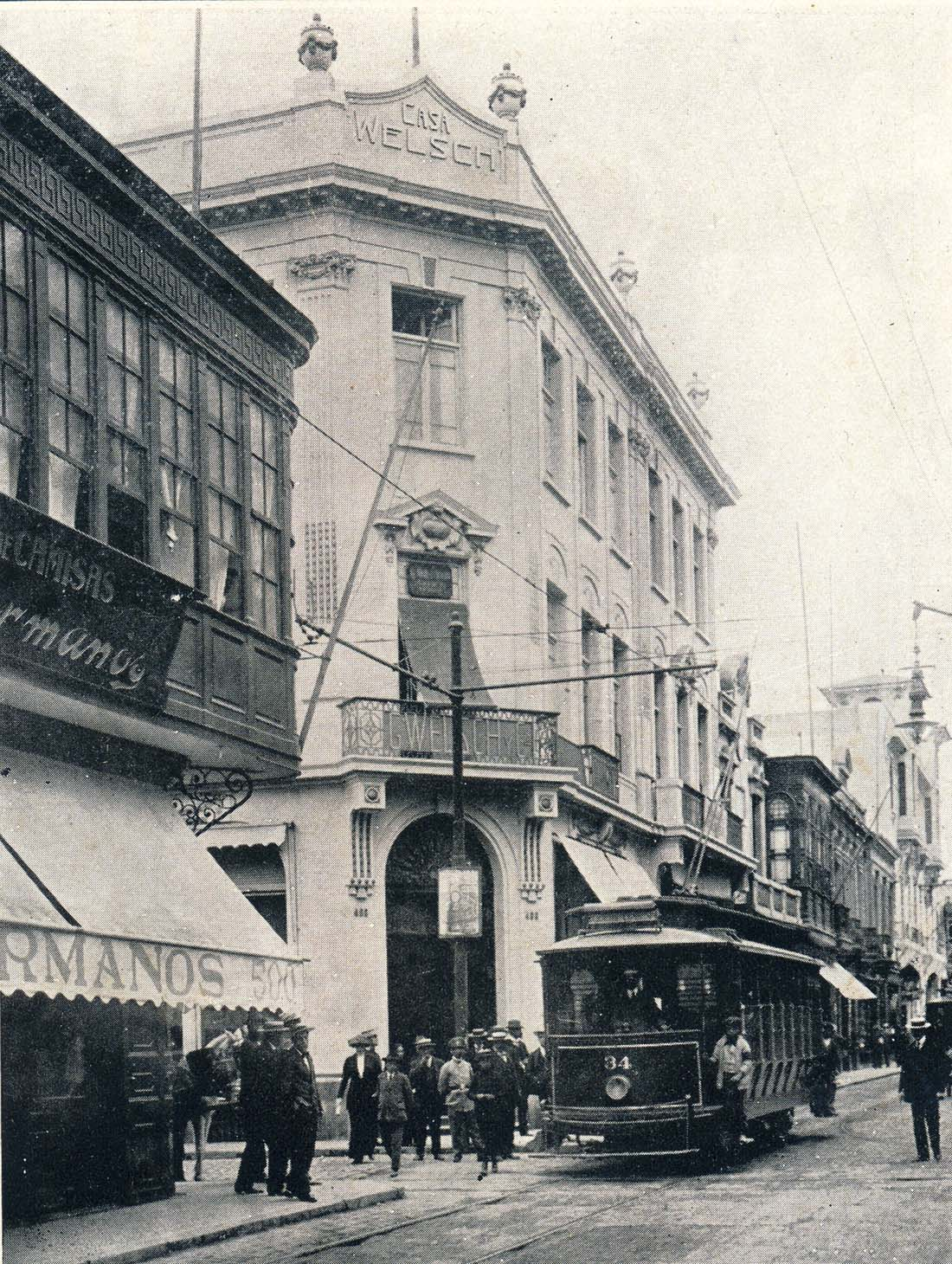 Tranvia eléctrico circulando en el Jirón de la Unión de la Ciudad de Lima - Perú según una foto de los años 10 del siglo XX